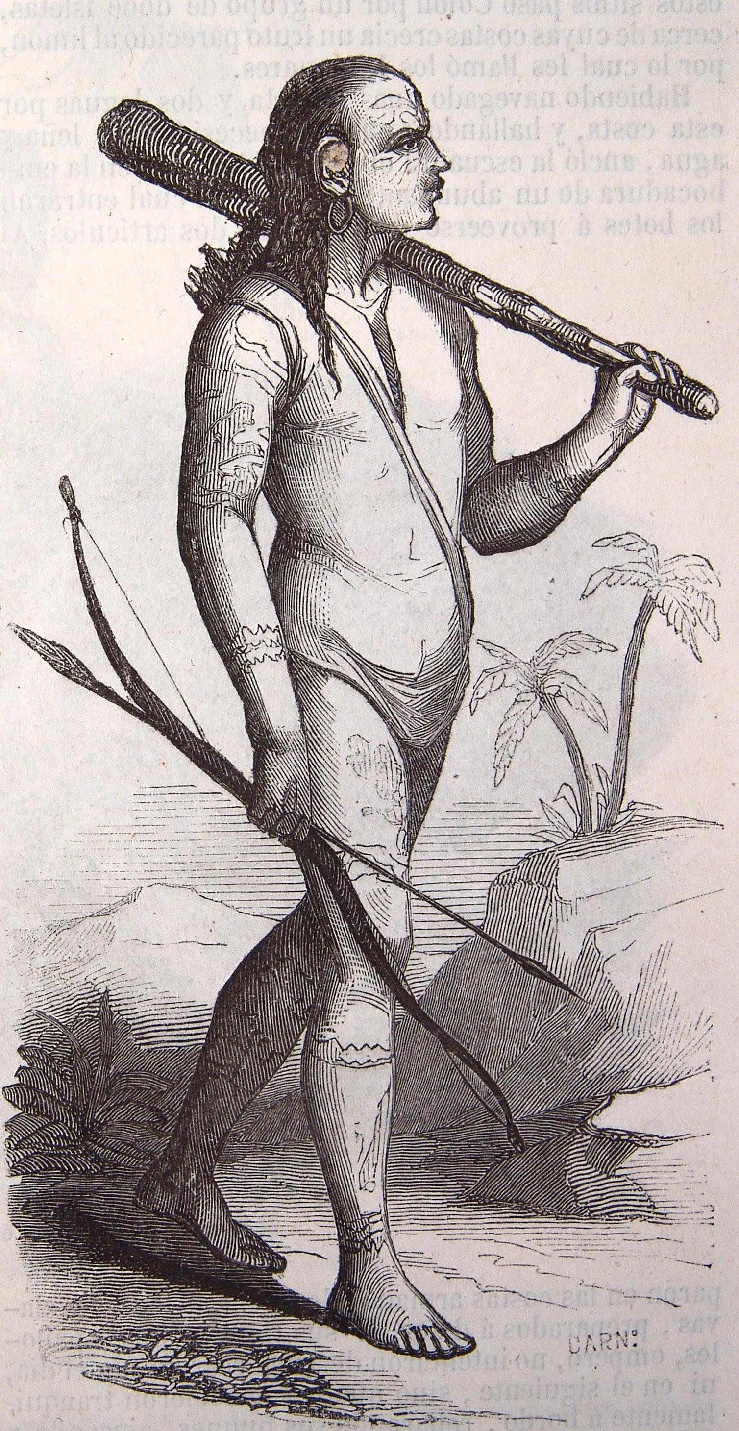 Natural dela costa de Honduras